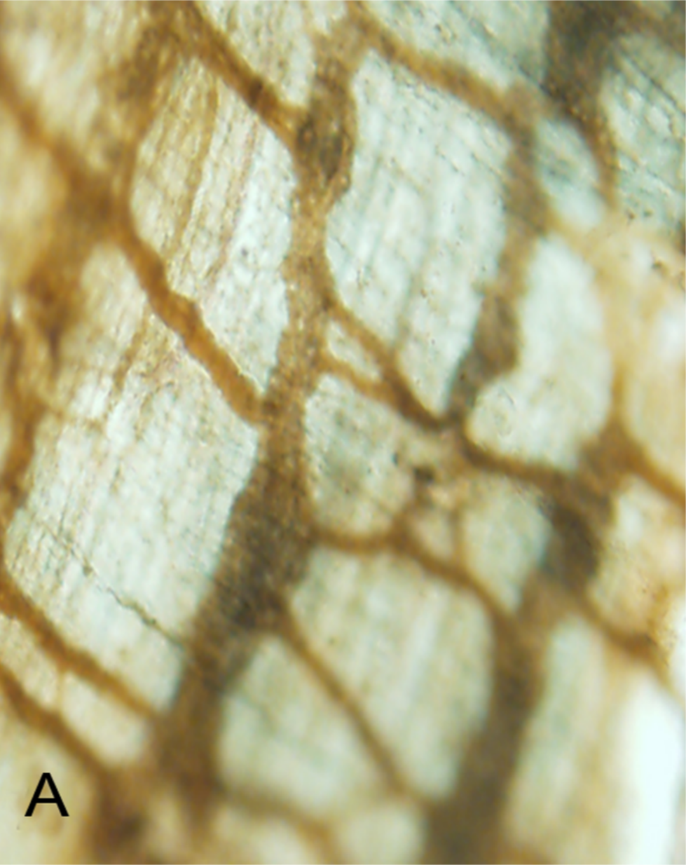 Figura 1. Células intersticiales de Cajal ICC-MY La tinción inmunohistoquímica se realizó sobre Músculo Longitudinal con Plexo mientérico adherente. Las células ICC-MY fueron identificadas por inmunorreactividad para el receptor c de tirosina quinasa c-Kit (CD117) color amarillo-pardo. (A) Muestra el segmento de colon ganglionar con estructura de red entretejida de las células ICC. Microscopía óptica. Aumento 40 ×.